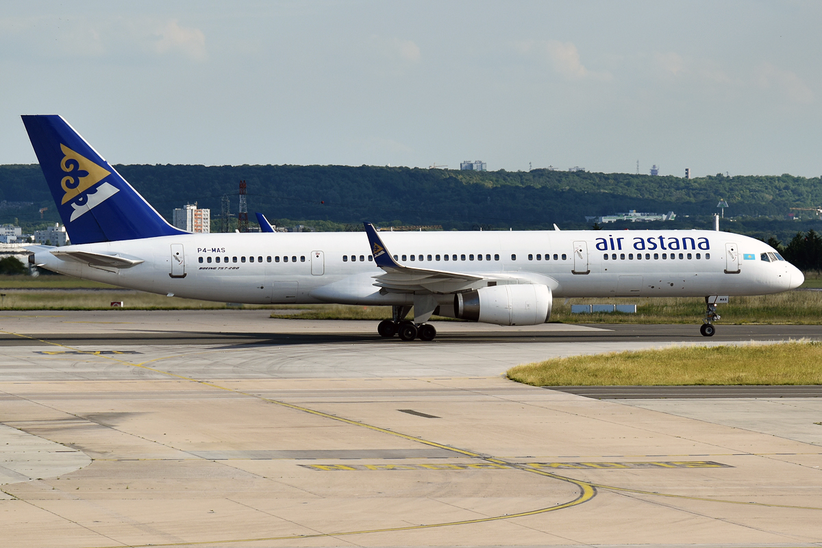 Air Astana, P4-MAS, Boeing 757-28A